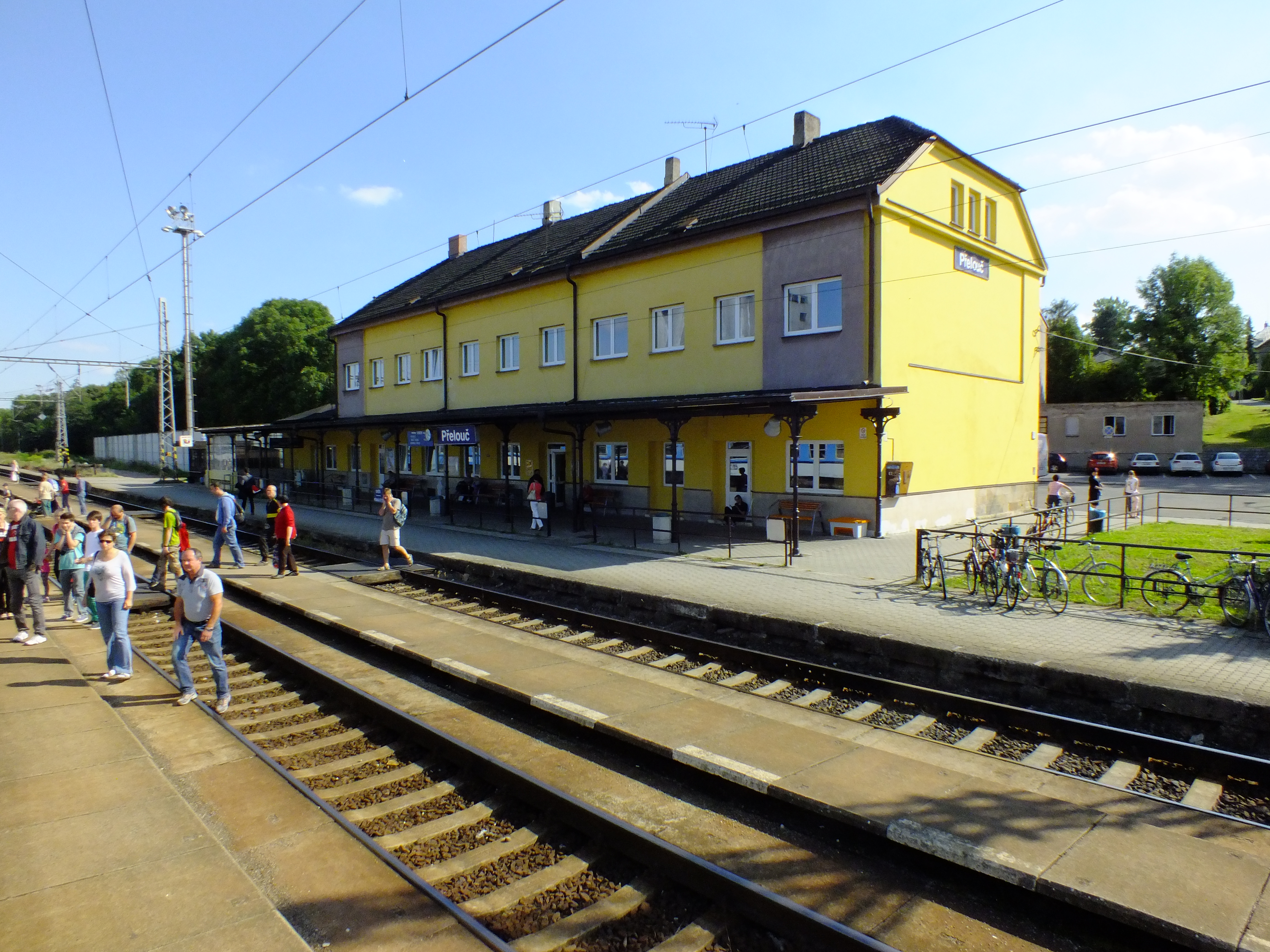 Staniční budova